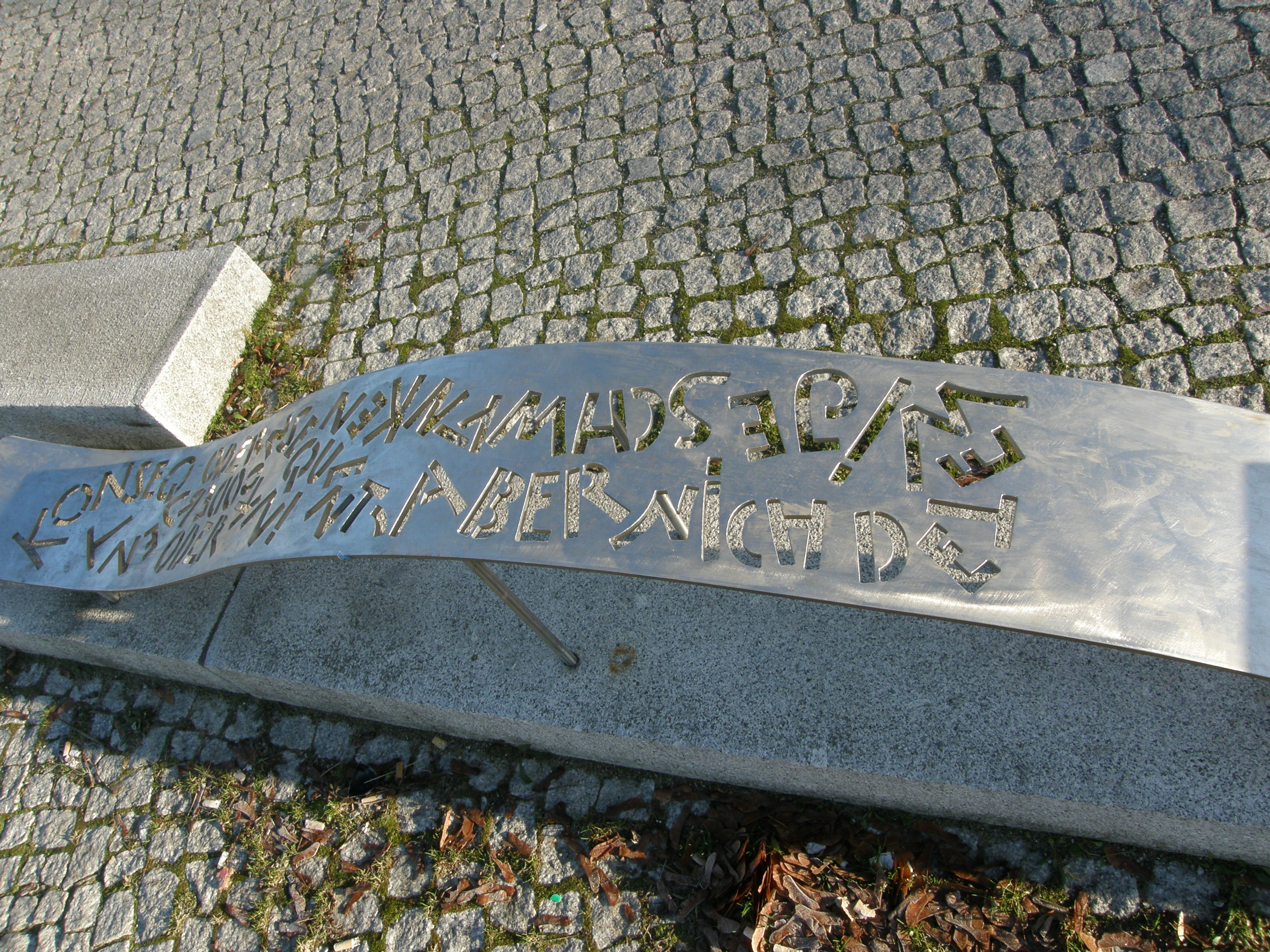 Berlin-Hellersdorf, Regine-Hildebrandt-Park, Spruchband 1